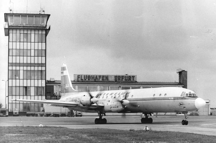 Erfurt, Flughafen, Tower, Flugzeug ADN-ZB Ludwig-2.7.79 Erfurt: Flugplatz der Bezirksstadt wurde nach umfangreichen Rekonstruktionarbeiten an der Start- und Landebahen sowie im Abfertigungsbereich wieder eröffnet. Die erste Maschine, die den Flughafen verließ, hatte Budapest zum Ziel. (Siehe auch M0702-25 N)